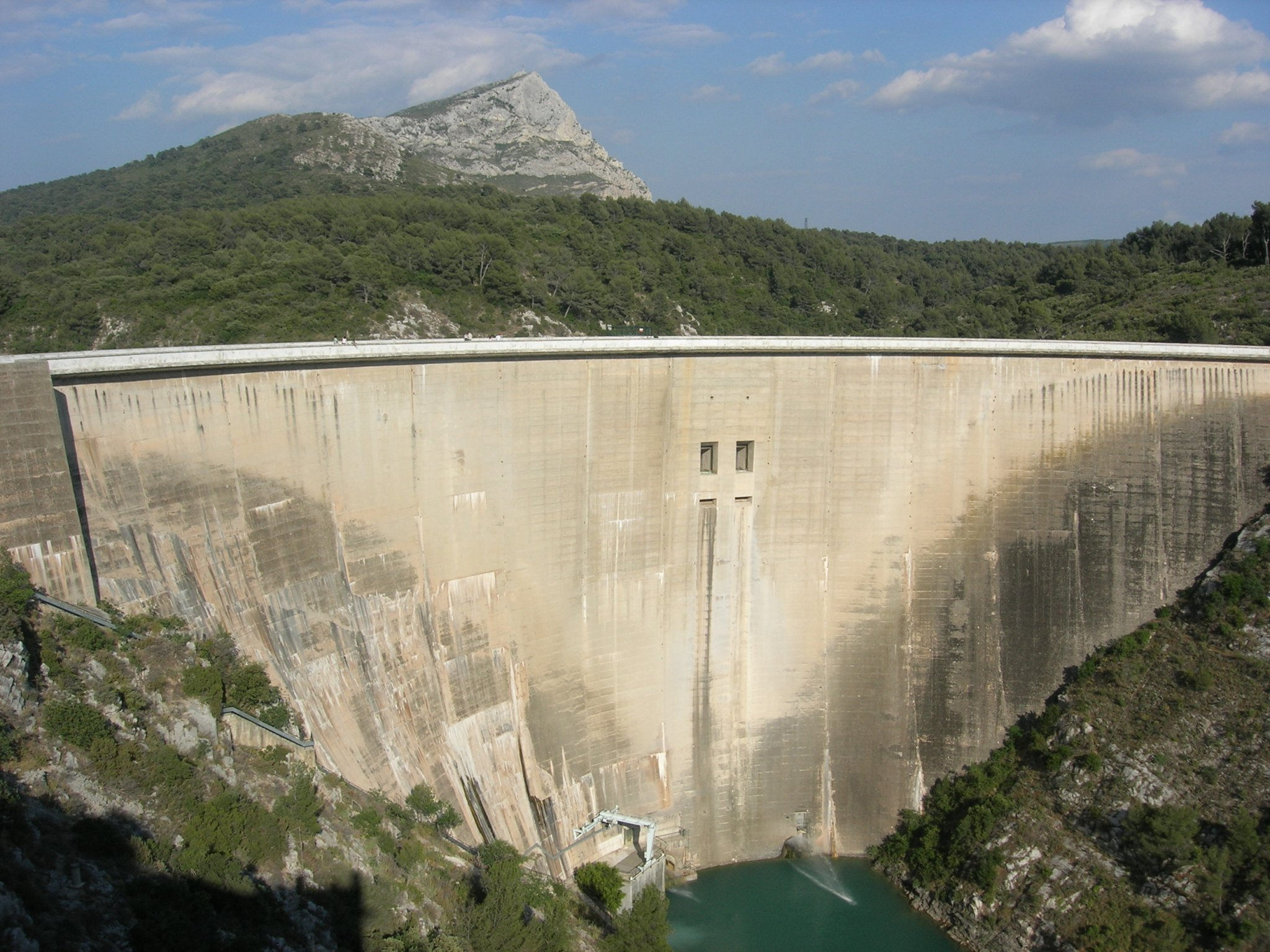 Photographie du barrage de Bimont, commune de Saint-Marc-Jaumegarde, Bouches-du-Rhône, France.